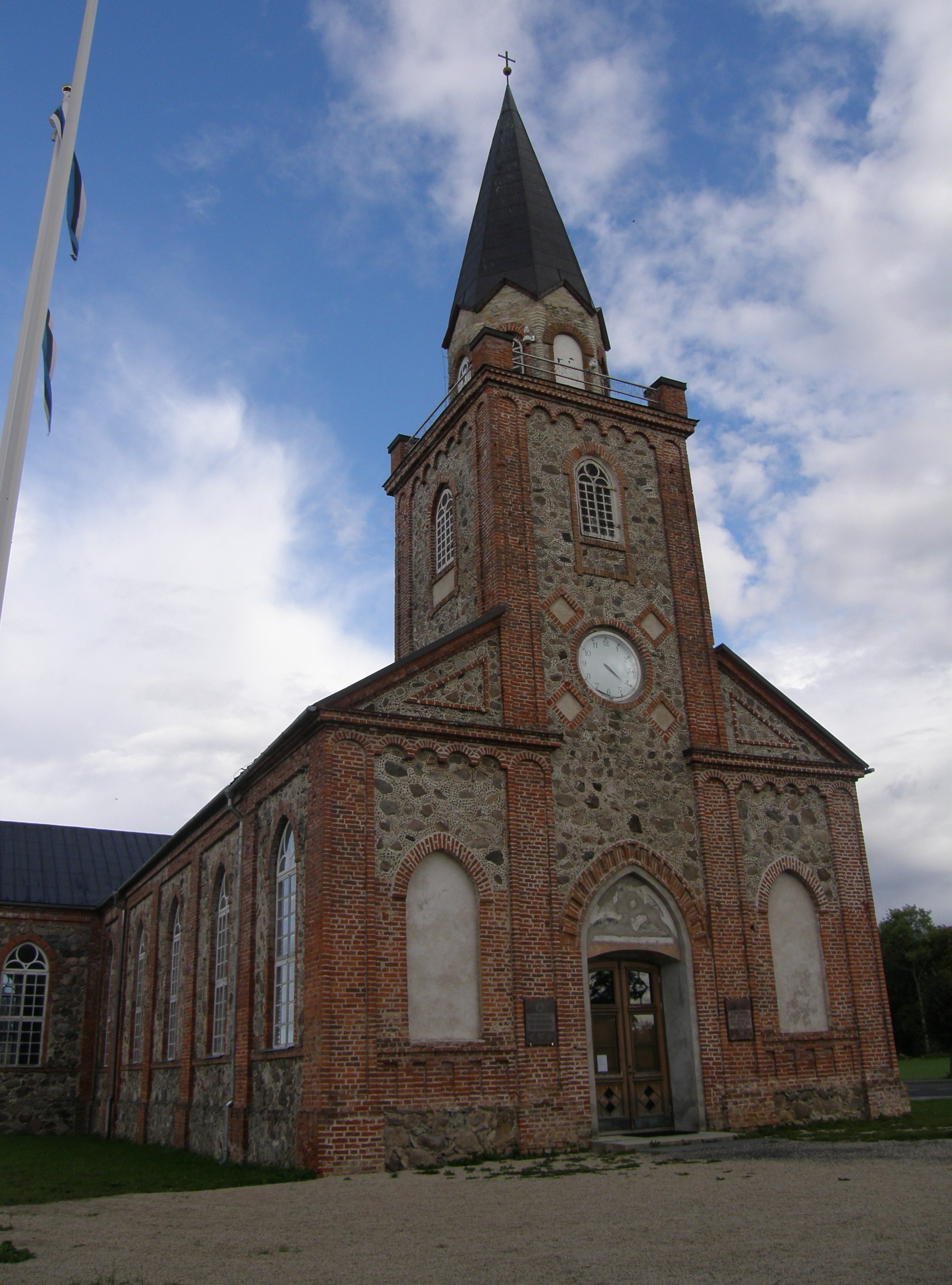 Tori kirik